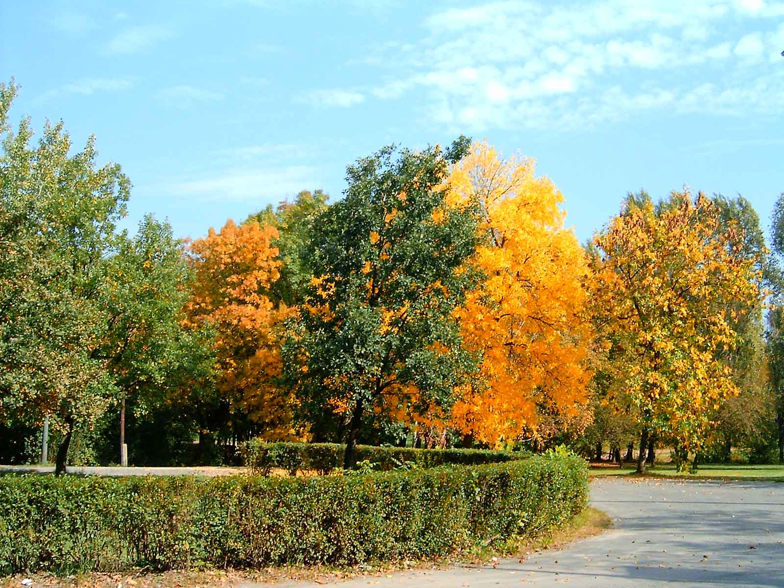 Fák az Óbudai-szigeten, más néven Hajógyári sziget (Budapest, III. kerület)